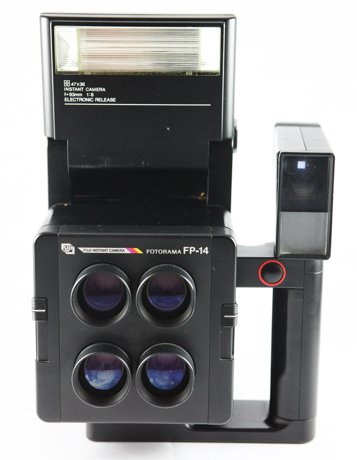 0484 Fuji FP-14